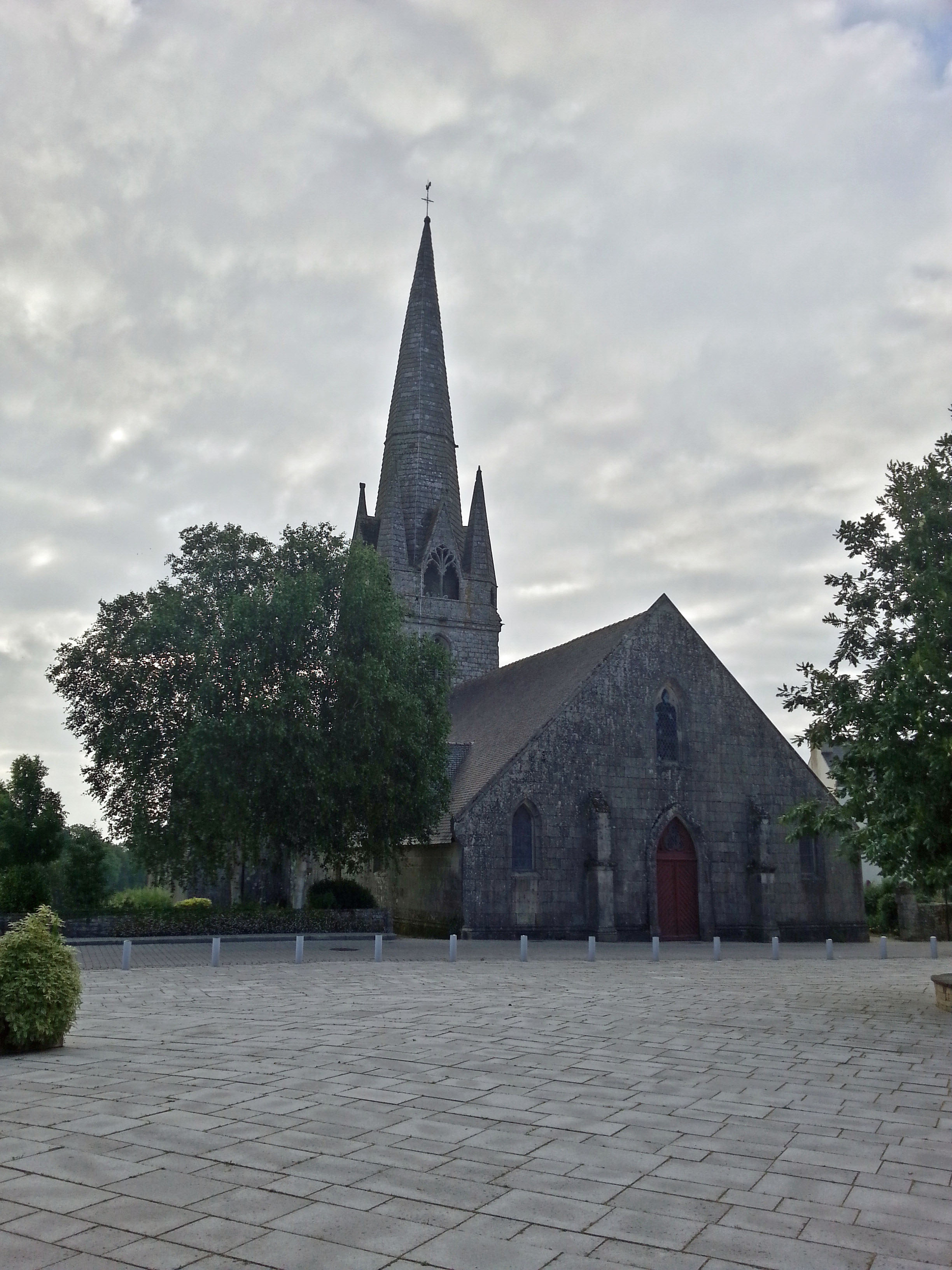 Église Notre-Dame de Rosporden